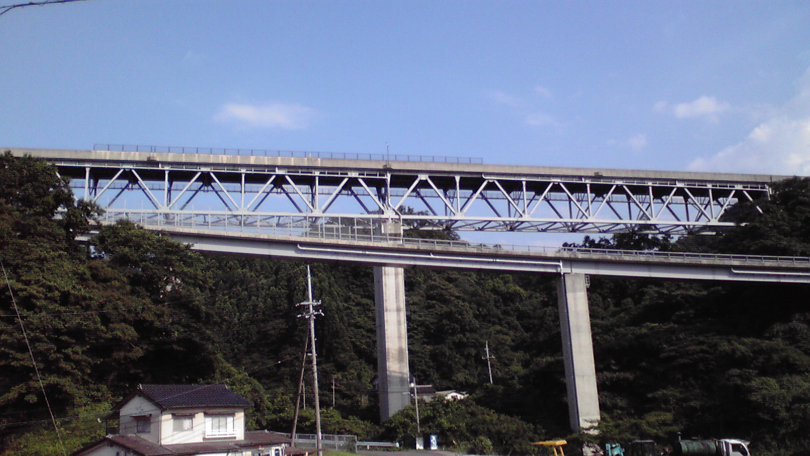 浜田道路の「みなと原井大橋」を下から撮影した写真です。